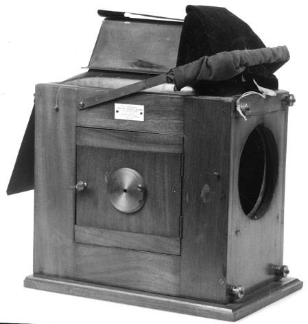 Een toverlantaarn van Newton&Co, afkomstig uit de collectie fotographica van de Bijzondere Collecties, Universiteitsbibliotheek Leiden